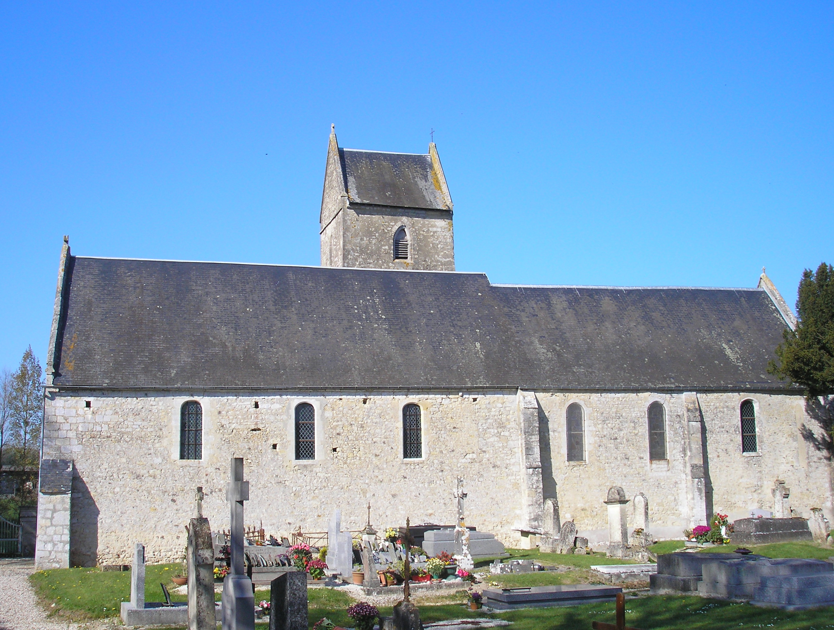 Arganchy (Normandie, France). L'église Sainte-Radegonde.